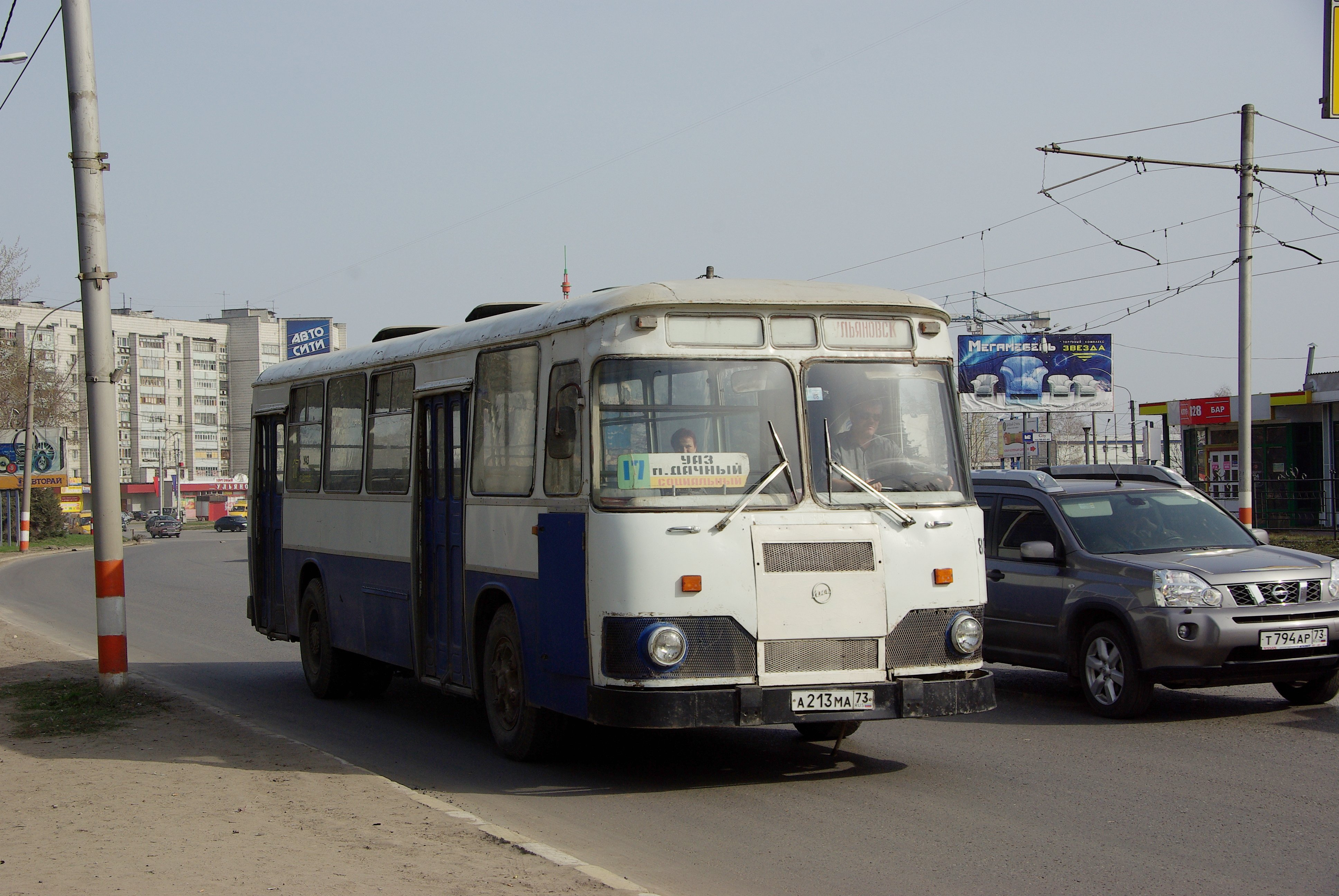 Автобус ЛиАЗ-677М в Ульяновске на 3 маршруте. Прошёл капитальный ремонт на заводе Авиастар-СП.